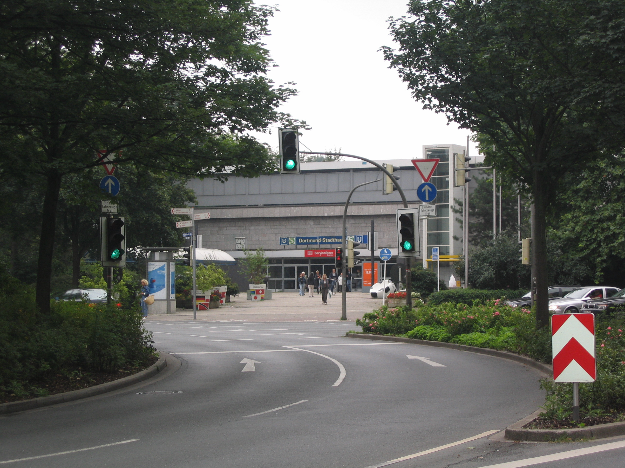 Bahnhof Dortmund Stadthaus Eigene Aufnahme August 2006